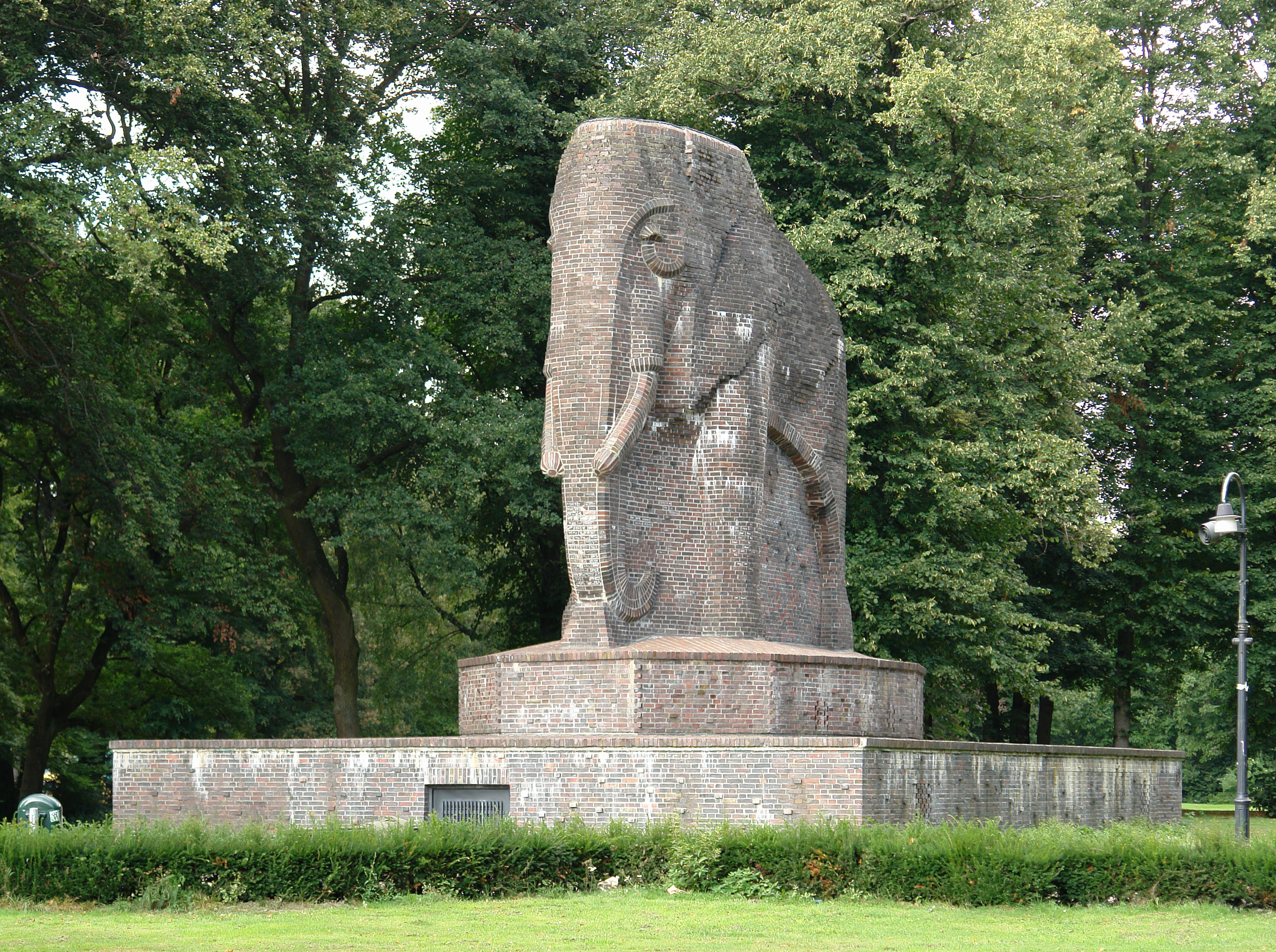 Kolonial-Ehrenmal, Anti-Kolonial-Denk-Mal in Bremen, Gustav-Deetjen-AlleeDas abgebildete Objekt ist ein geschütztes Kulturdenkmal in der Freien Hansestadt Bremen, mit der Nr. 1771 beim Landesamt für Denkmalpflege registriert.